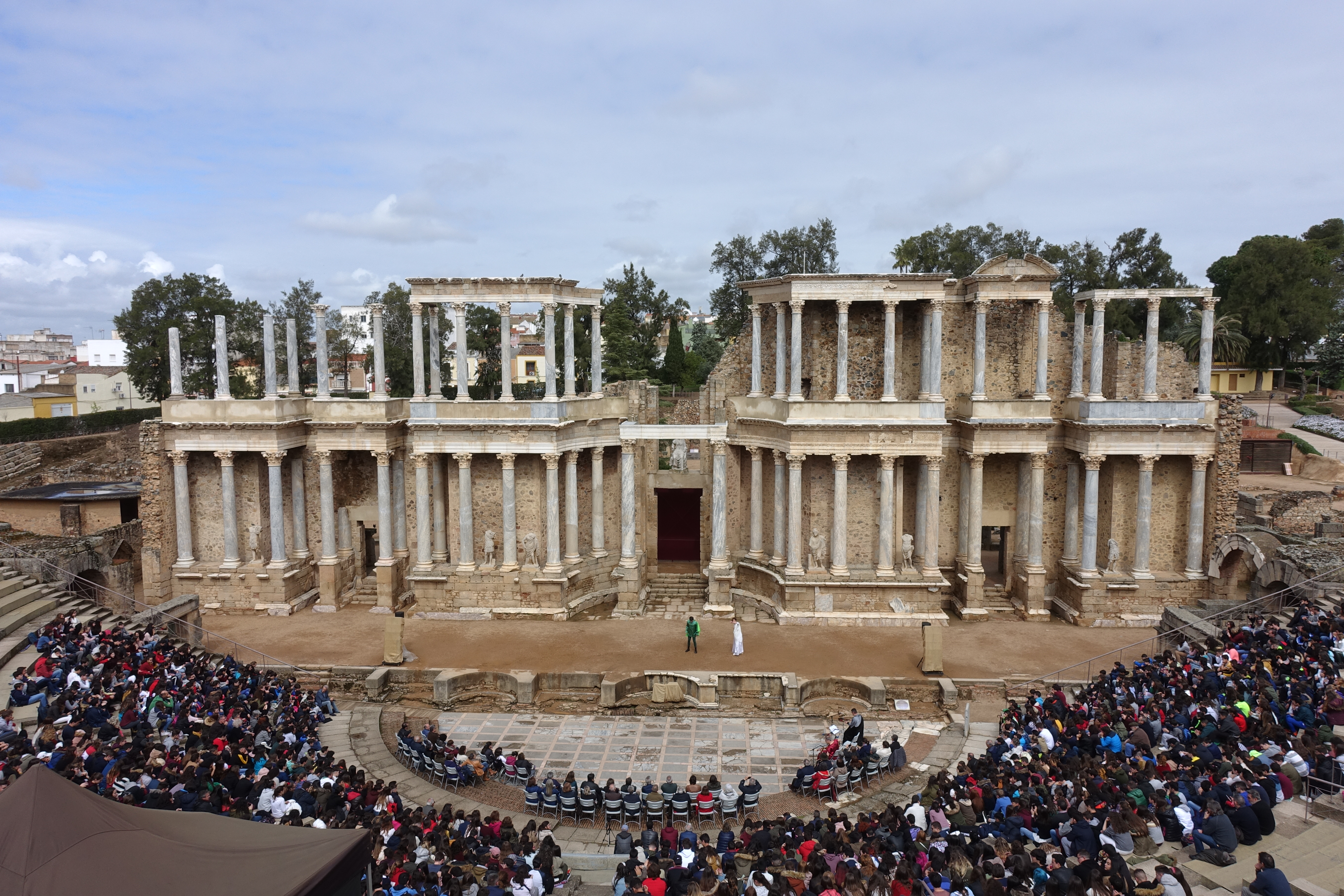 Representación en el teatro romano de Mérida (España) durante el XXII Festival Juvenil Europeo de Teatro Grecolatino.